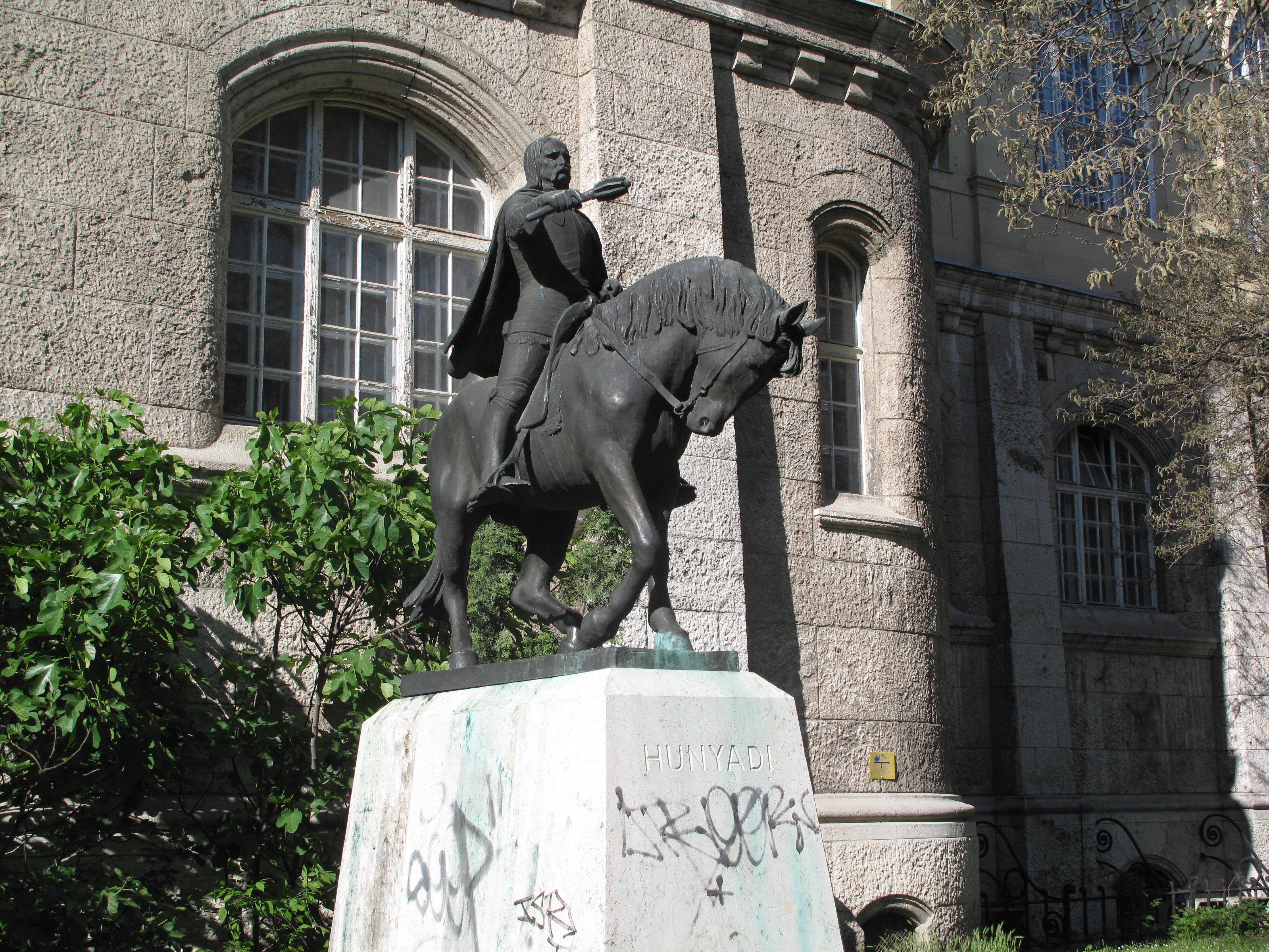 Budapešť